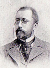 Čeněk Zíbrt